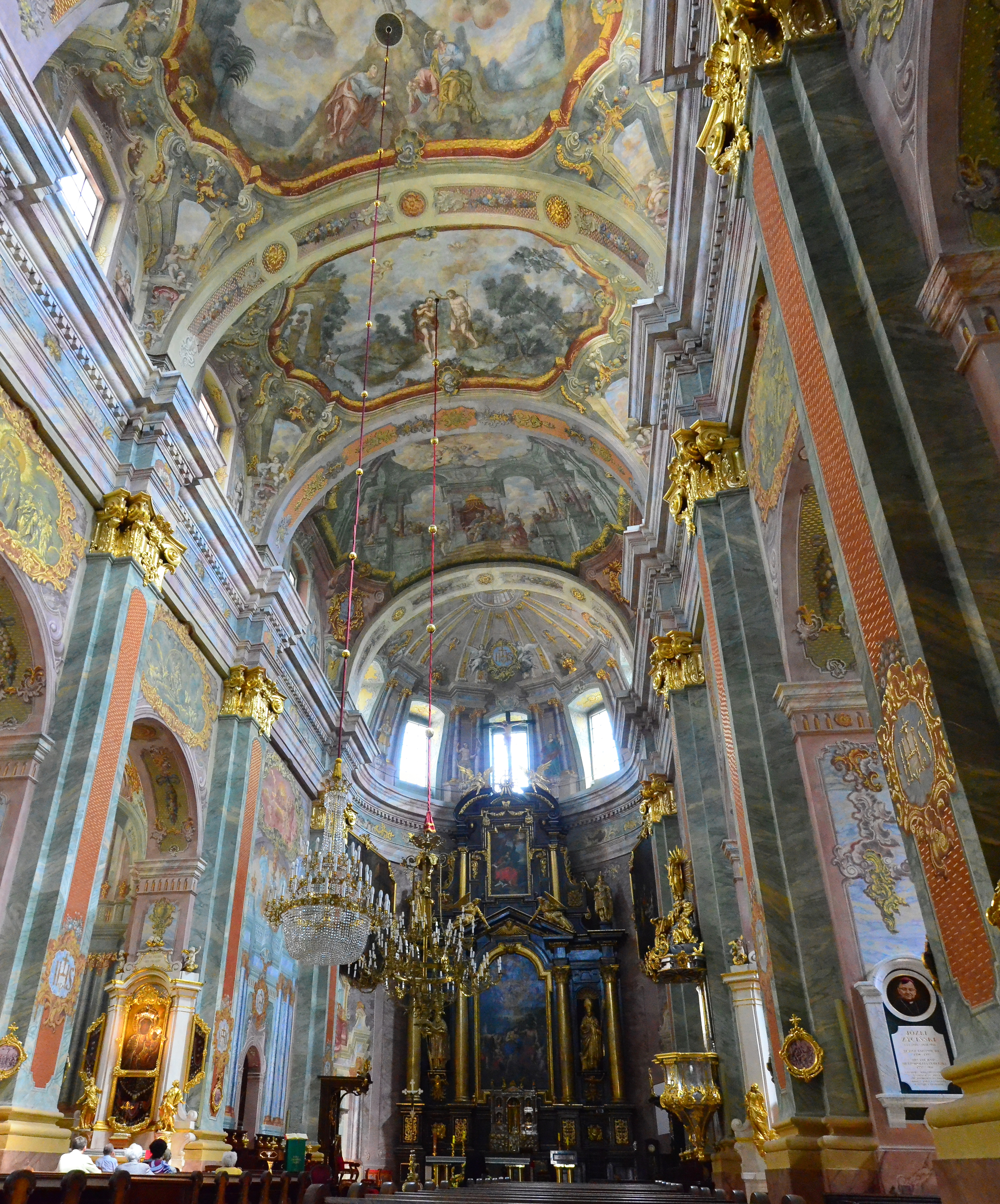 nawa główna w lubelskiej Archikatedrze